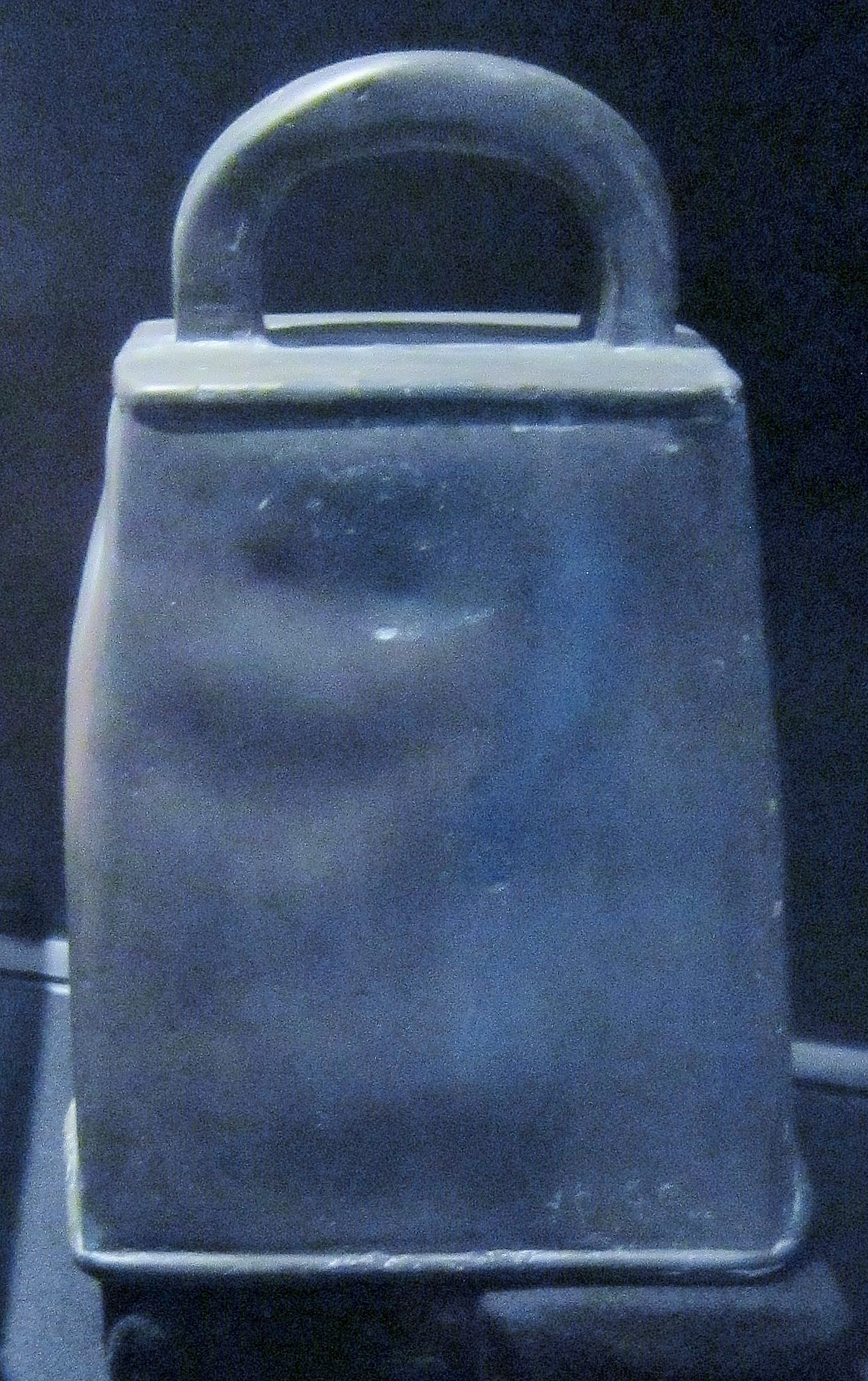 La cloche à main dite de saint Goulven qui se trouve dans l'église paroissiale Saint-Goulven de Goulien ; datant du Haut Moyen-Âge, elle est encore imposée le jour du pardon sur la tête des fidèles à l'issue des offices (moulage exposé au Musée de l'abbaye de Landévennec).